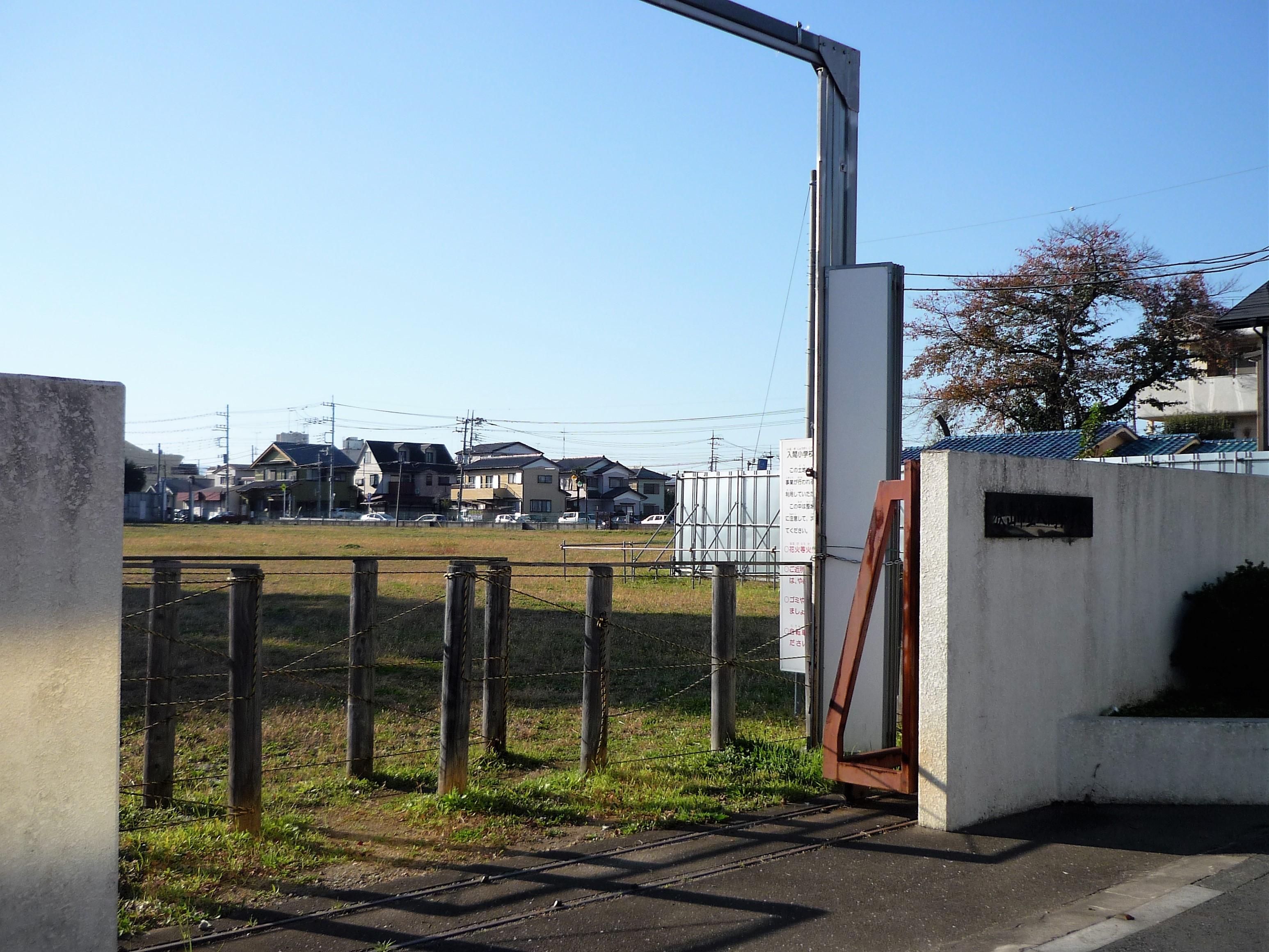 狭山市立入間小学校跡地 Panasonic Lumix DMC-FS3